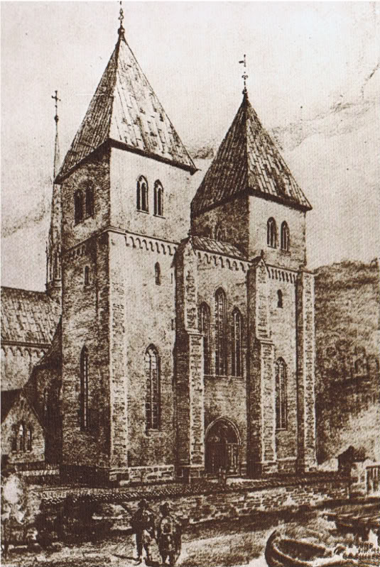 Mariakirken i Oslo